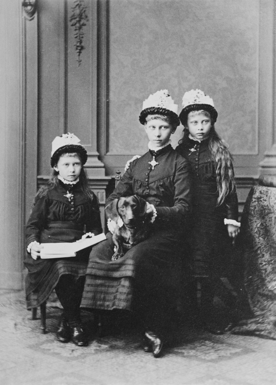 Drei Töchter des deutschen Kaisers Friedrich III (drei Schwestern von Wilhelm II), vlnr: Prinzessin Sophie von Preußen (* 14. Juni 1870) Prinzessin Victoria von Preußen (* 12. April 1866) Prinzessin Margarethe (* 22. April 1872)